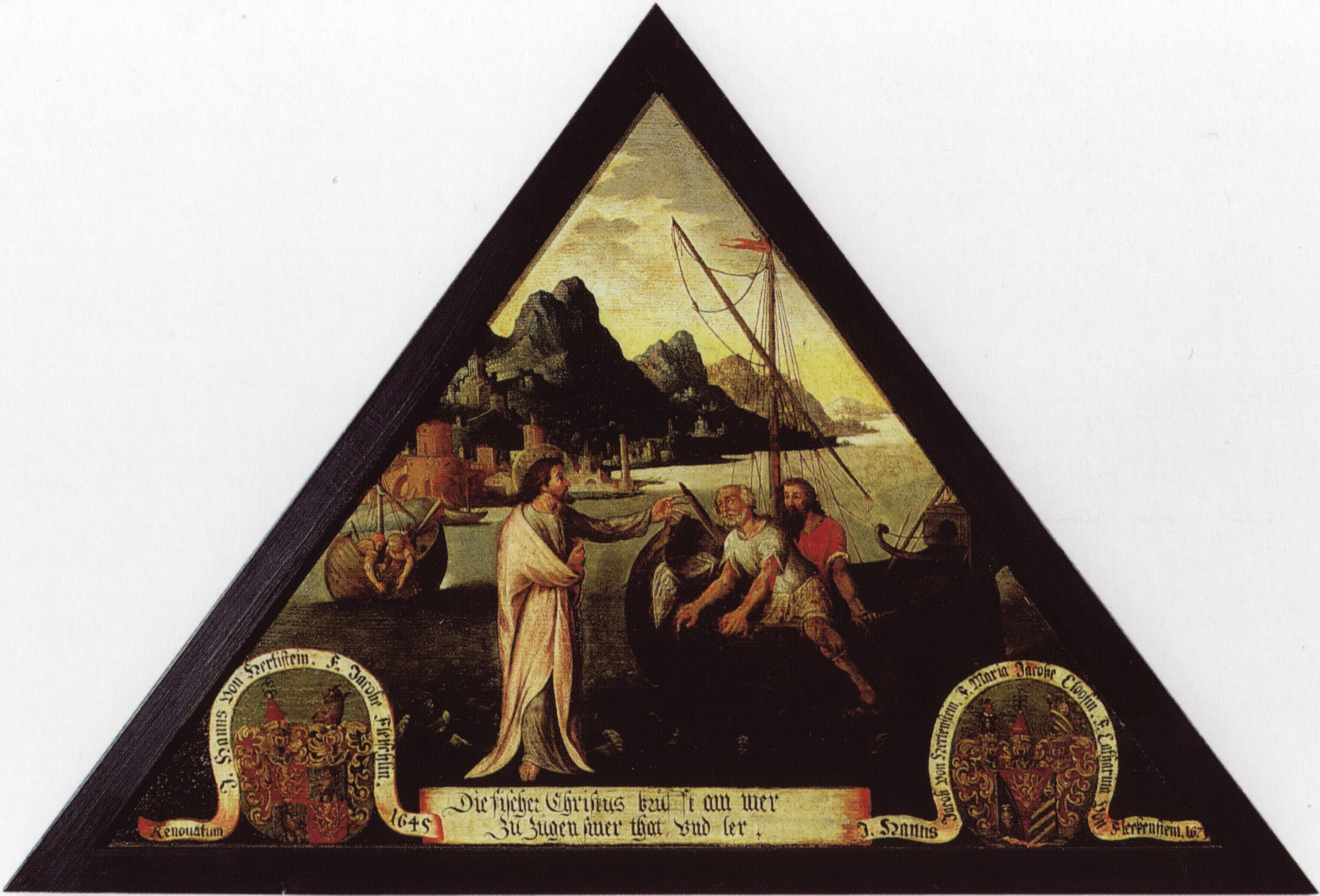 Berufung der ersten Jünger; Bild 64 des Bilderwegs auf der Luzerner Hofbrücke.